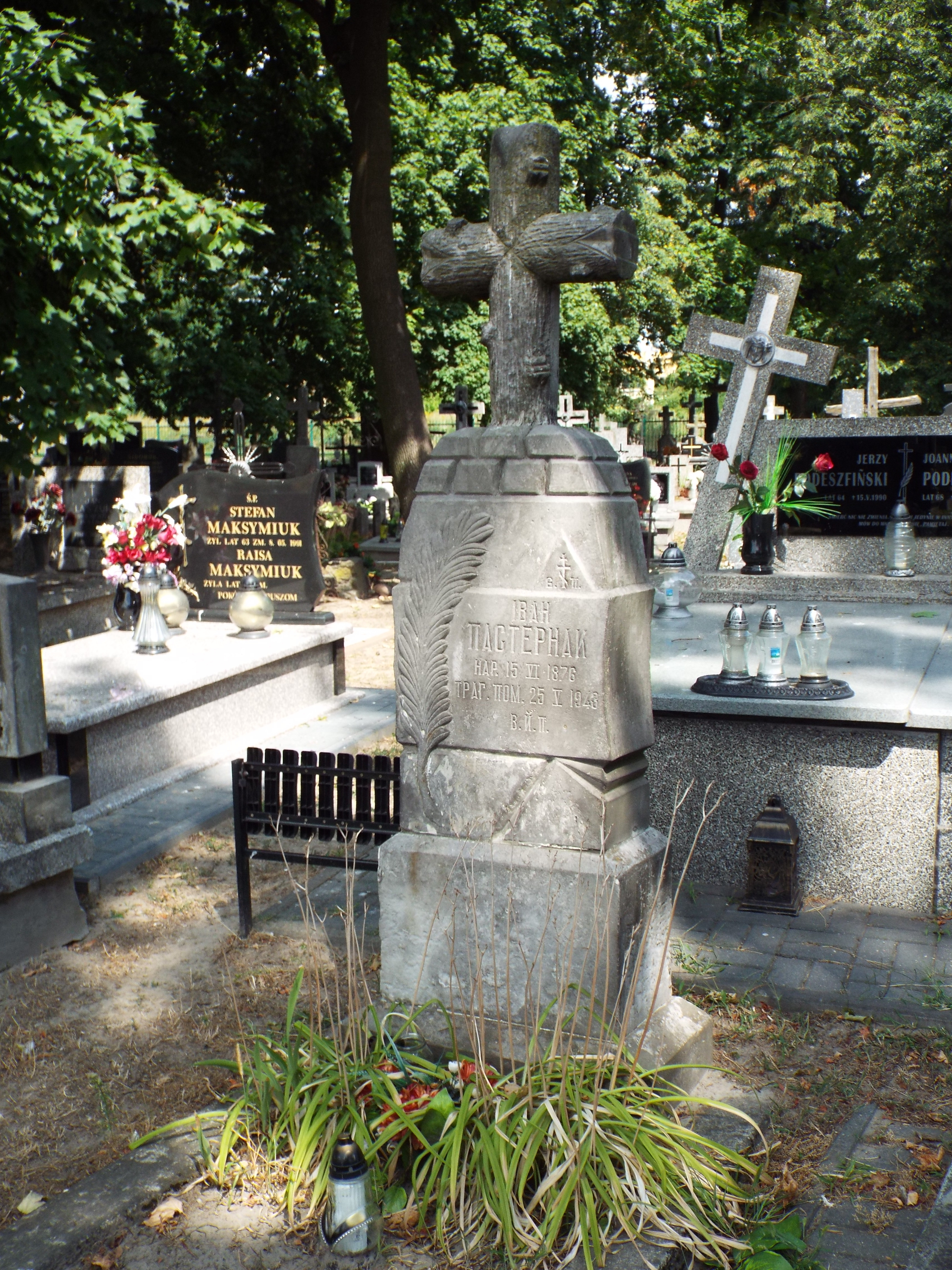 Biała Podlaska, cmentarz prawosławny - nagrobek Iwana Pasternaka